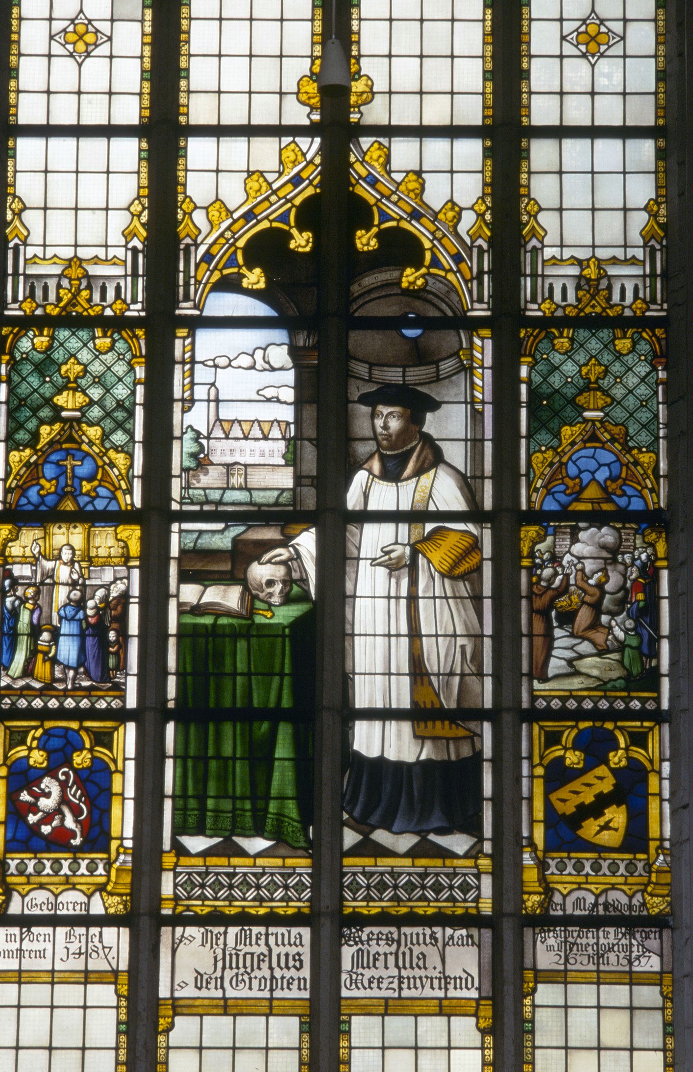 Grote kerk of Catharijnekerk: Interieur gebrandschilderd glas met afbeelding van Merula, in de noorderzijbeuk